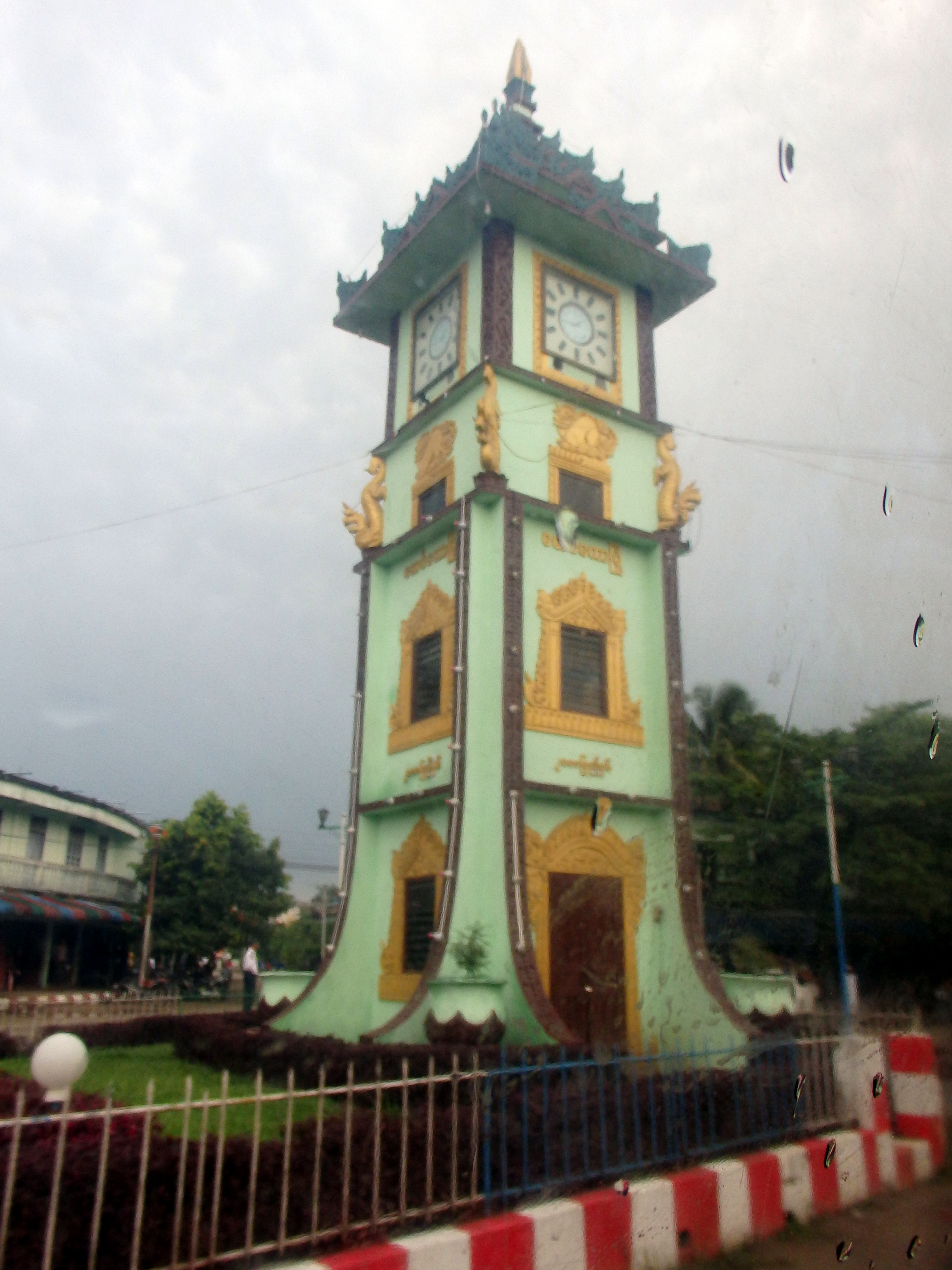 Maungdaw, Myanmar (Burma)